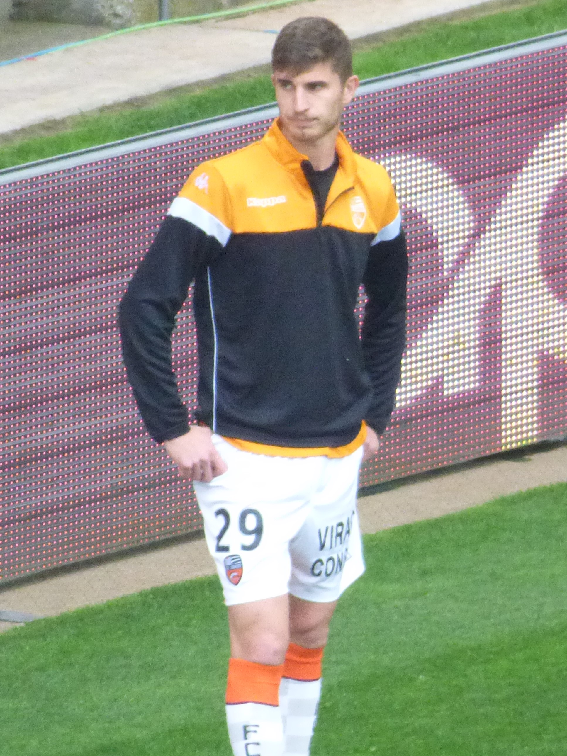 Pierre-Yves Hamel avant le match RC Lens / FC Lorient, comptant pour la 34ème journée du championnat de France de Ligue 2 de football 2018-2019, le 23 avril 2019, au Stade Bollaert-Delelis.